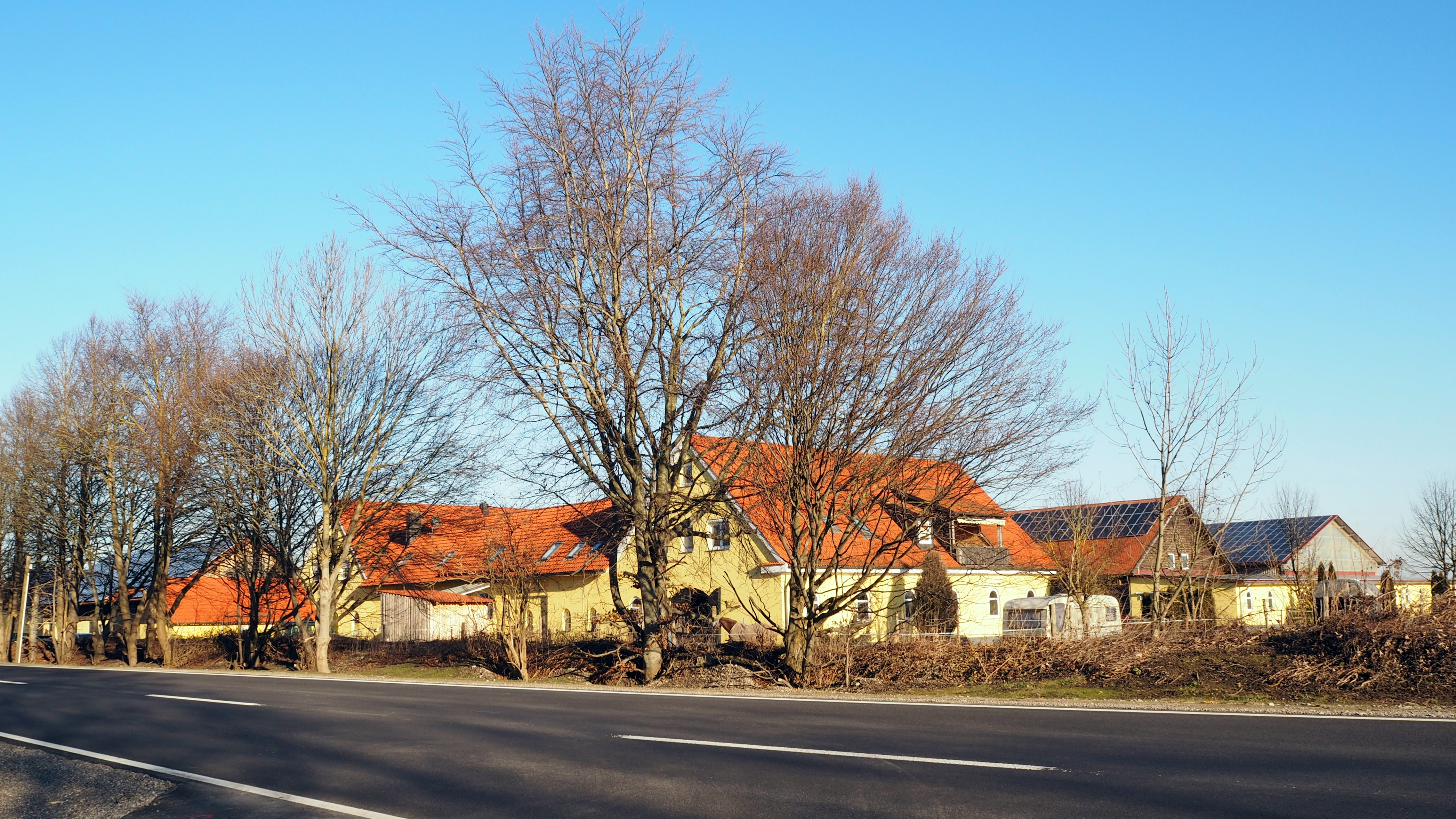 Renovierter Gutshof nordöstlich von Ettringen (Wertach), heute Reitanlage (Pferdesportzentrum Ettringen)